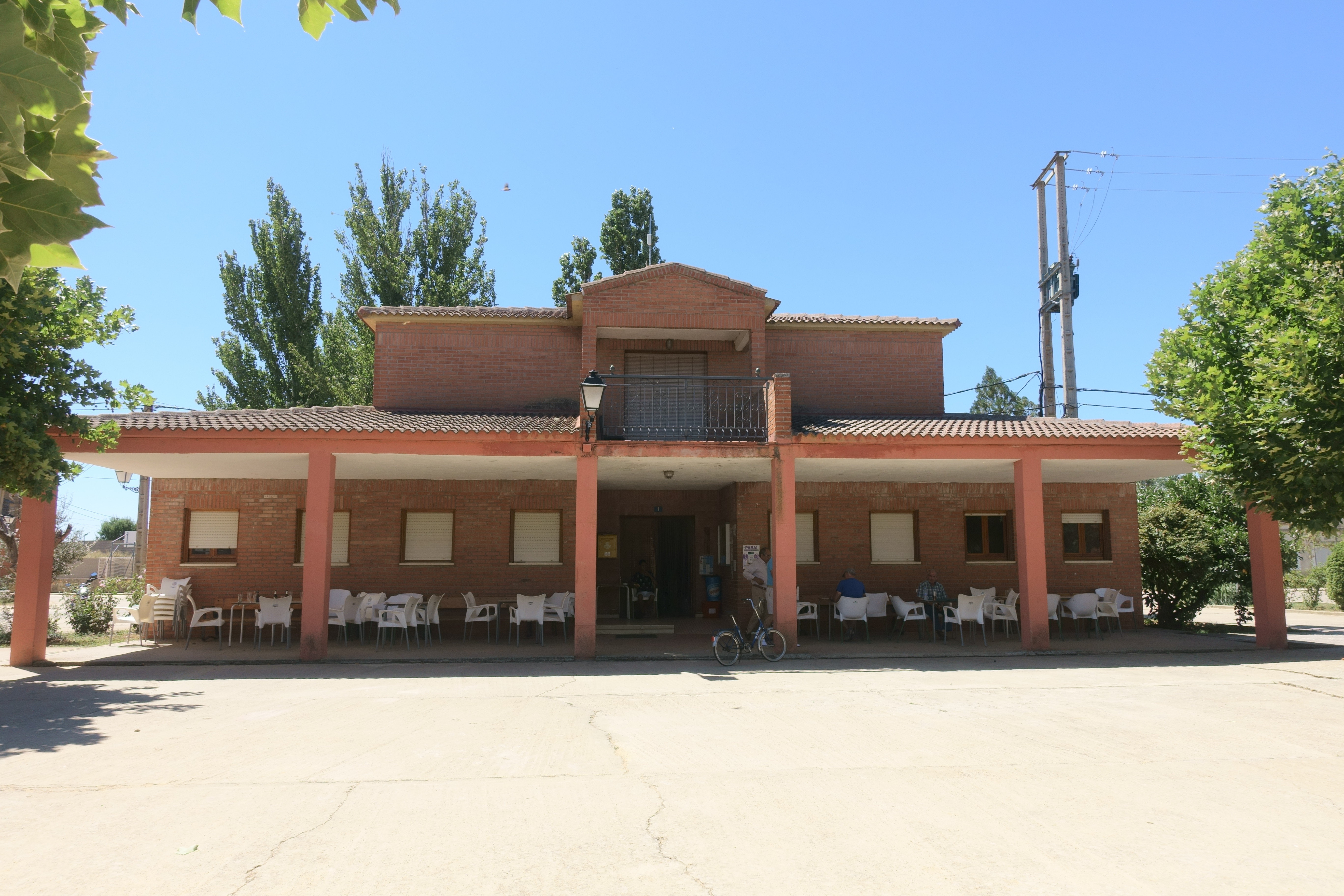 Casa consistorial de Villagómez la Nueva (Valladolid, España).